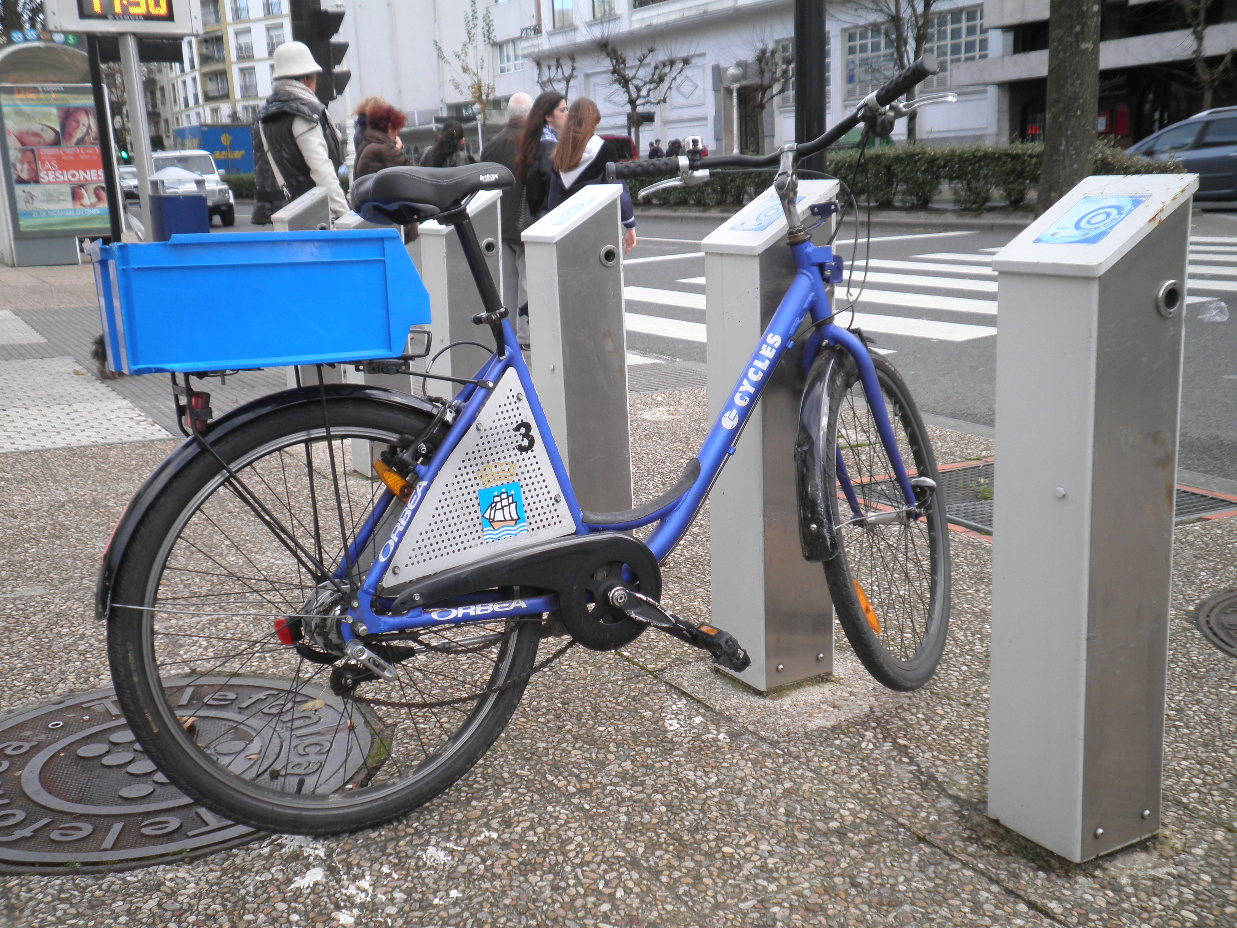 Dbizi zerbitzuko bizikleta